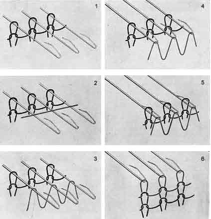 Maschenbildung mit Spitzennadeln